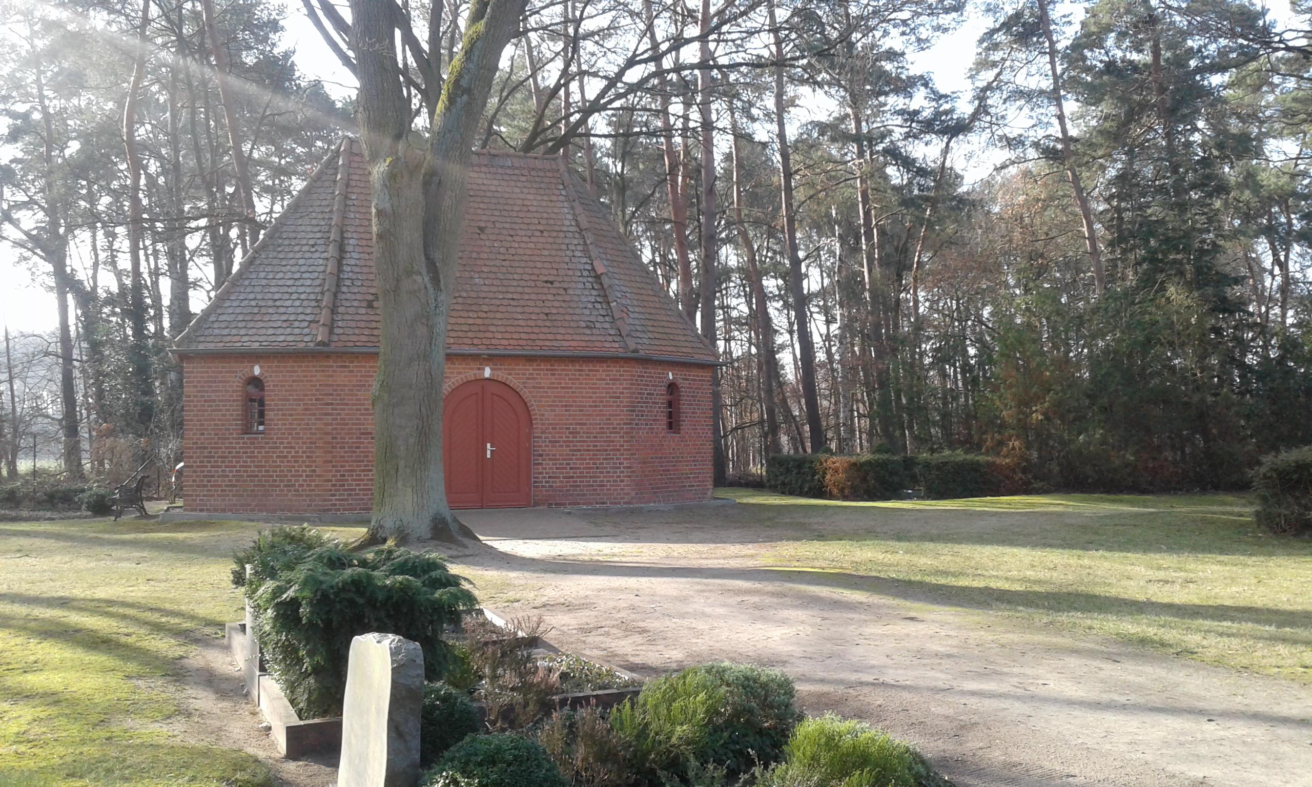 Kapelle